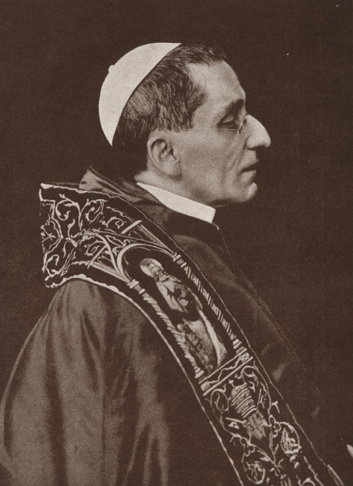 Papst Benedikt XV.